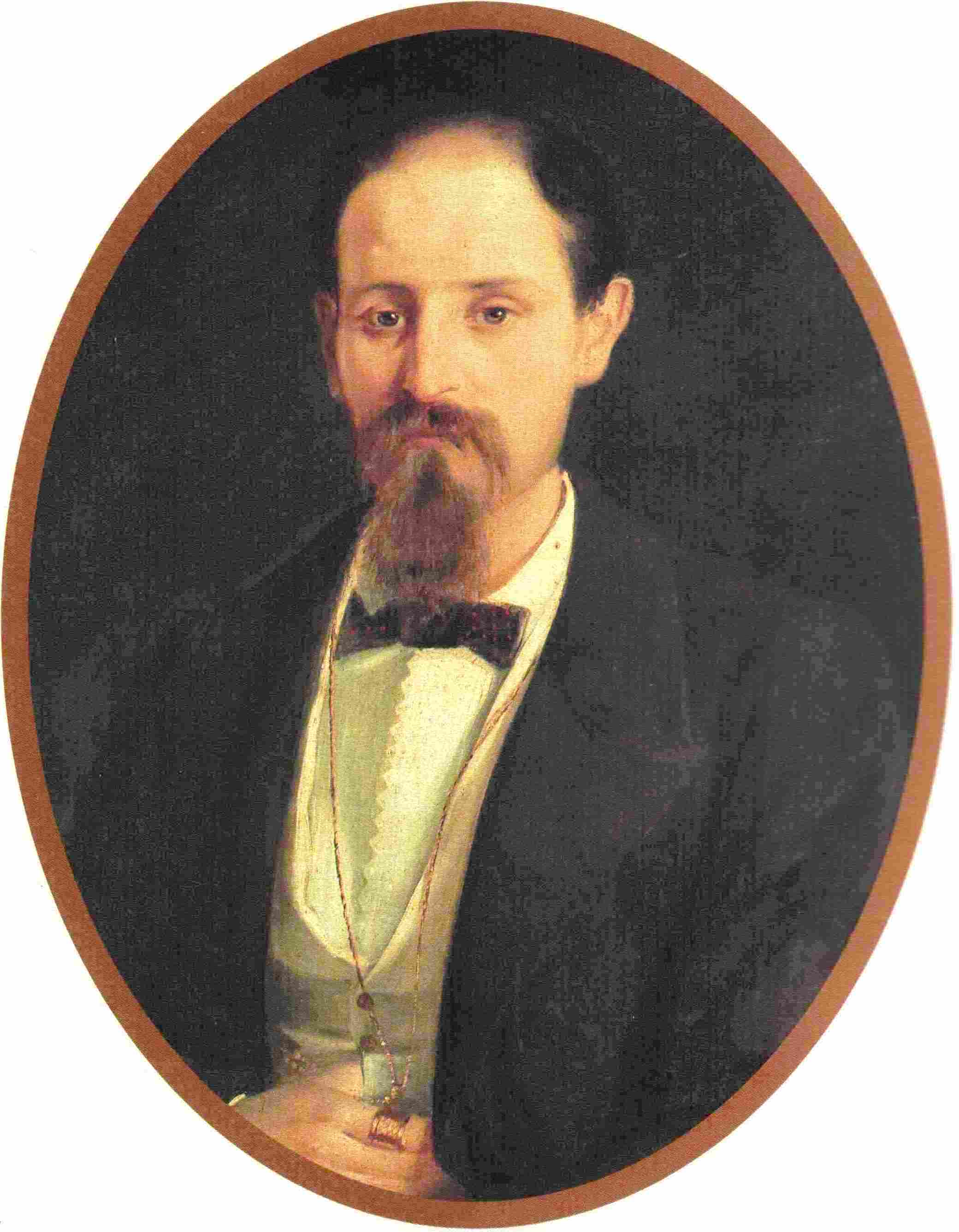 Rocco Bormioli senior (1830-1883), imprenditore italiano.